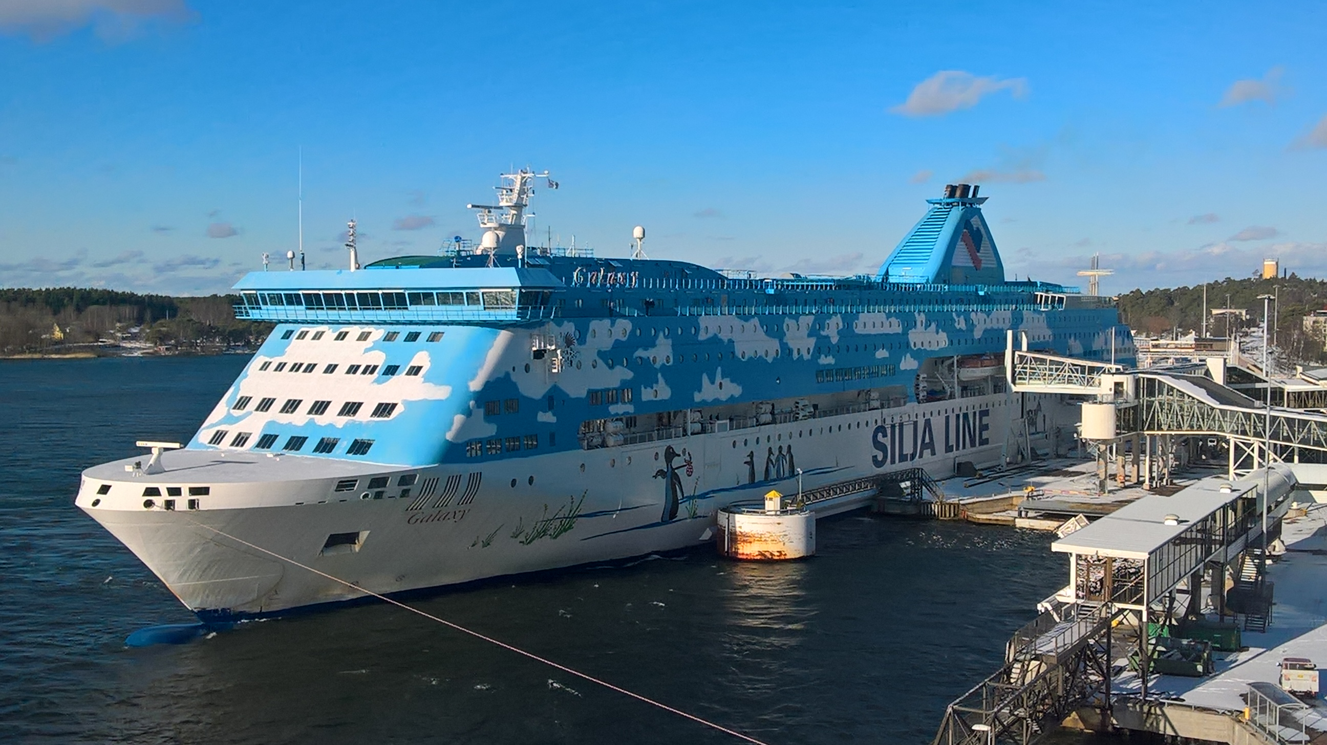 Galaxy maarianhaminassa